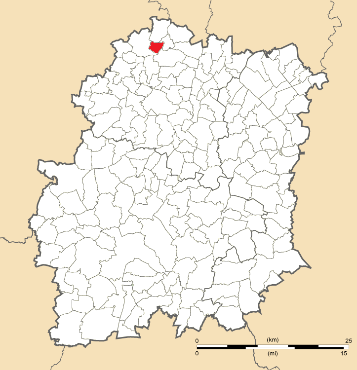 Carte de position de Vauhallan en Essonne (91)